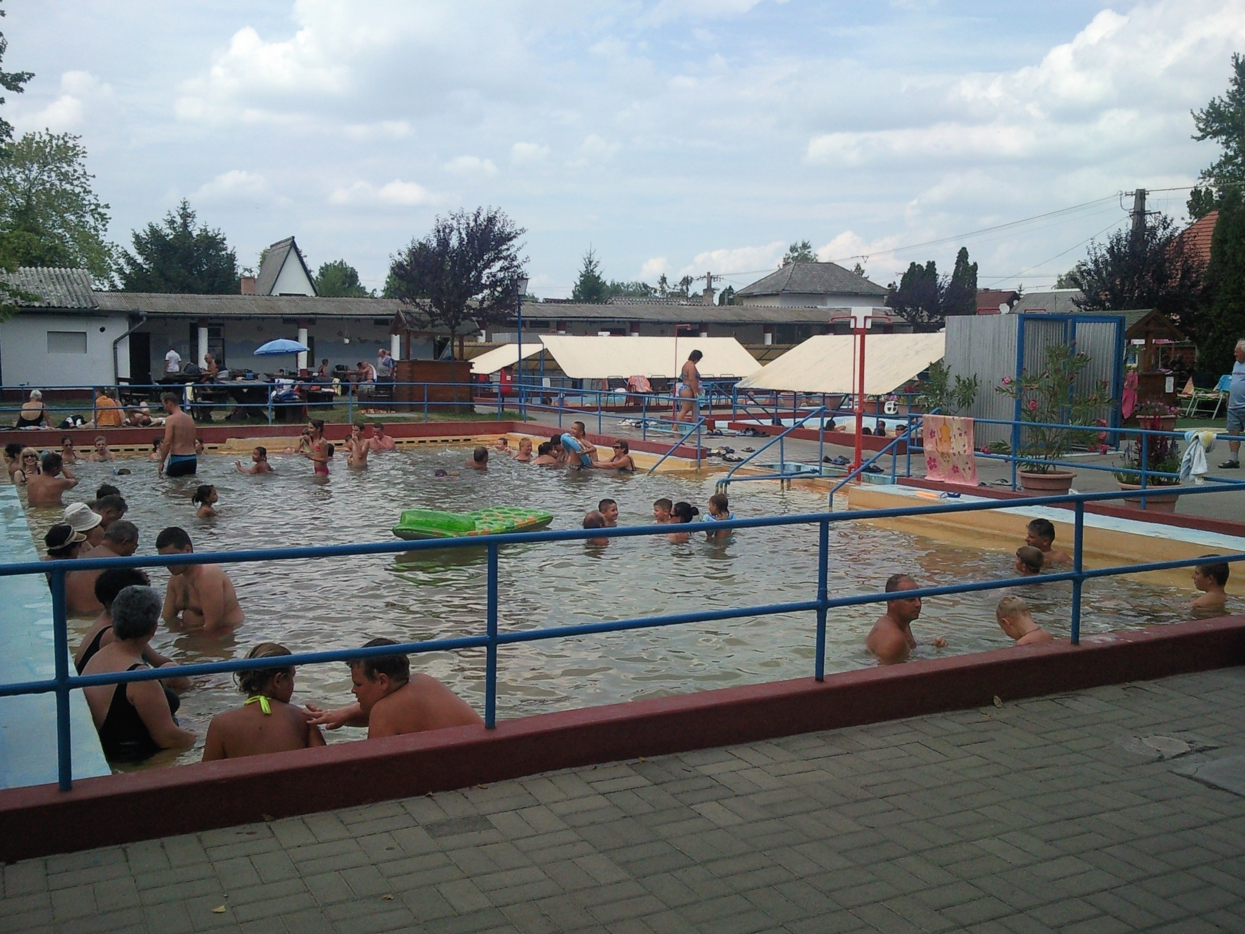 Buzsák, Csisztafürdő, 8695 Hungary